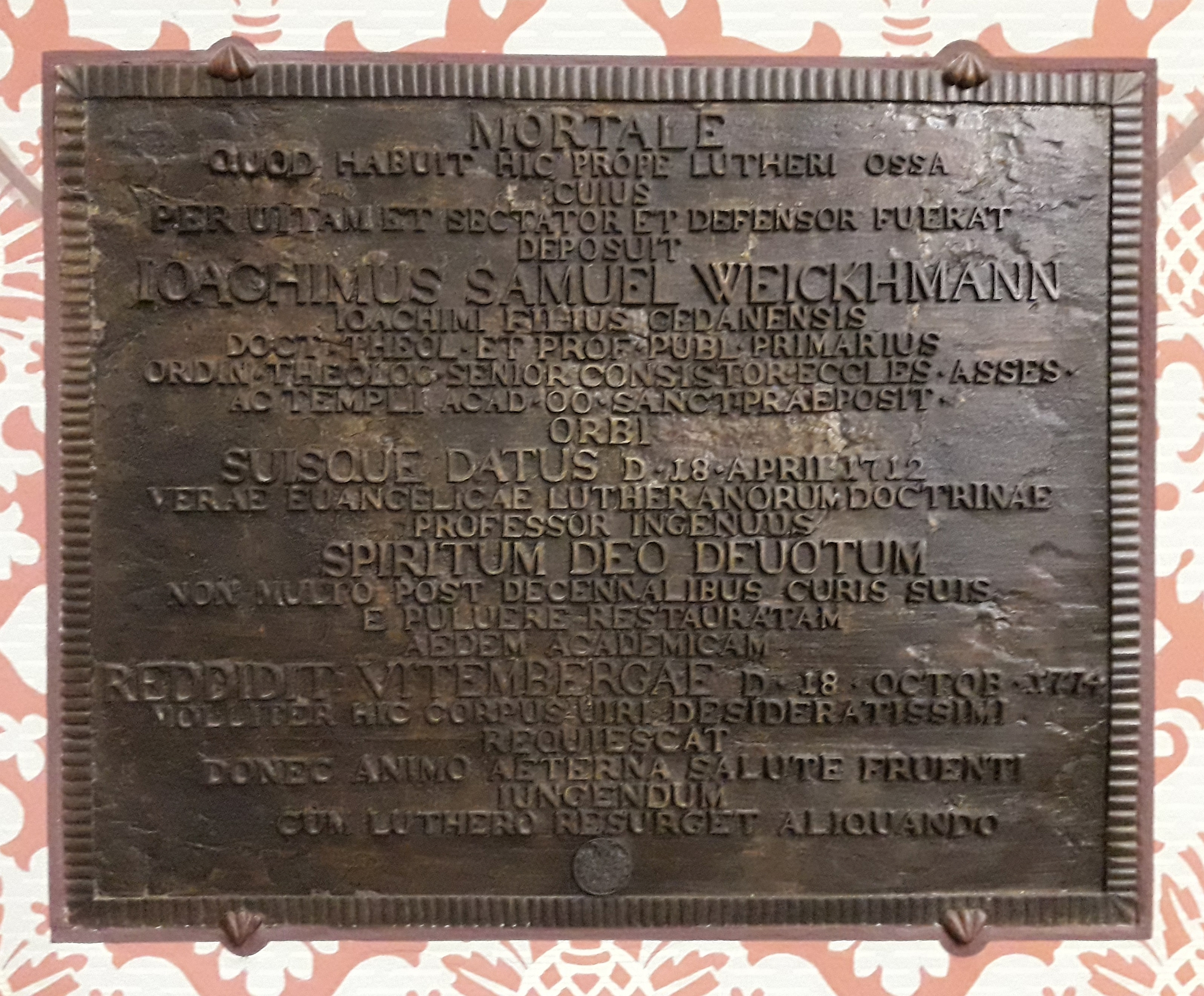 Denkmal für Joachim Samuel Weickmann in der Schlosskirche Wittenberg